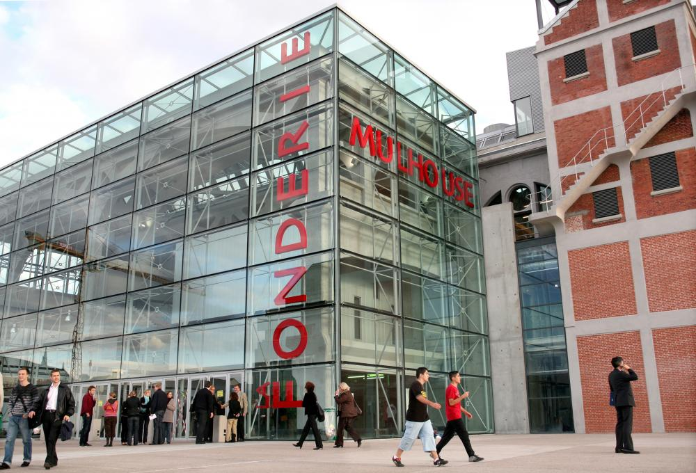 campus de la fonderie, Mulhouse - Libre de droit